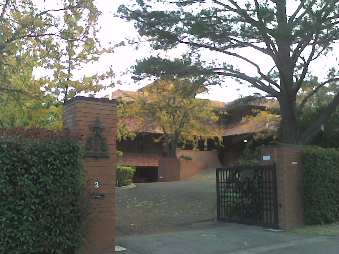 Apostolic Nuncio in Canberra